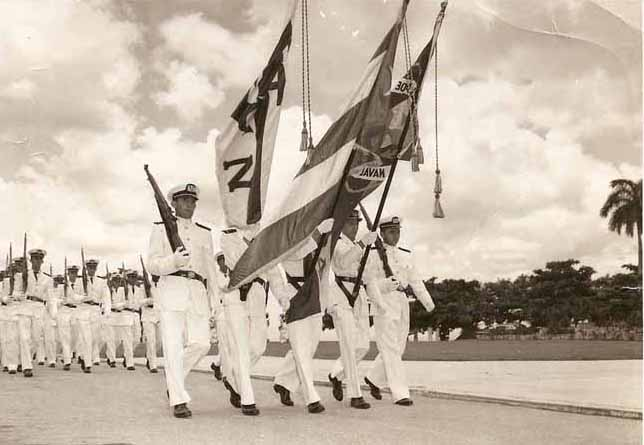 Desfile Promocion XIV y XV